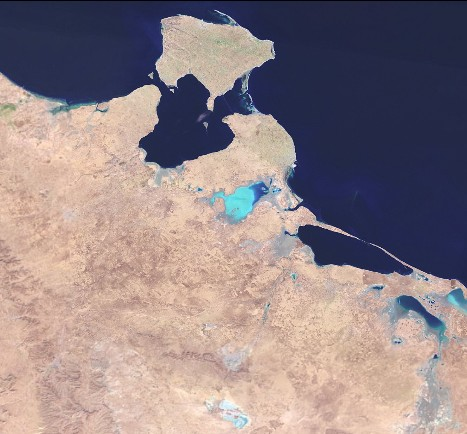 Satellite image of Djerba, Guetaïa el Gueblia, Guetaïet el Baharia, Jeliji, Boughrara Gulf, El Bibane Lake (Tunisia)